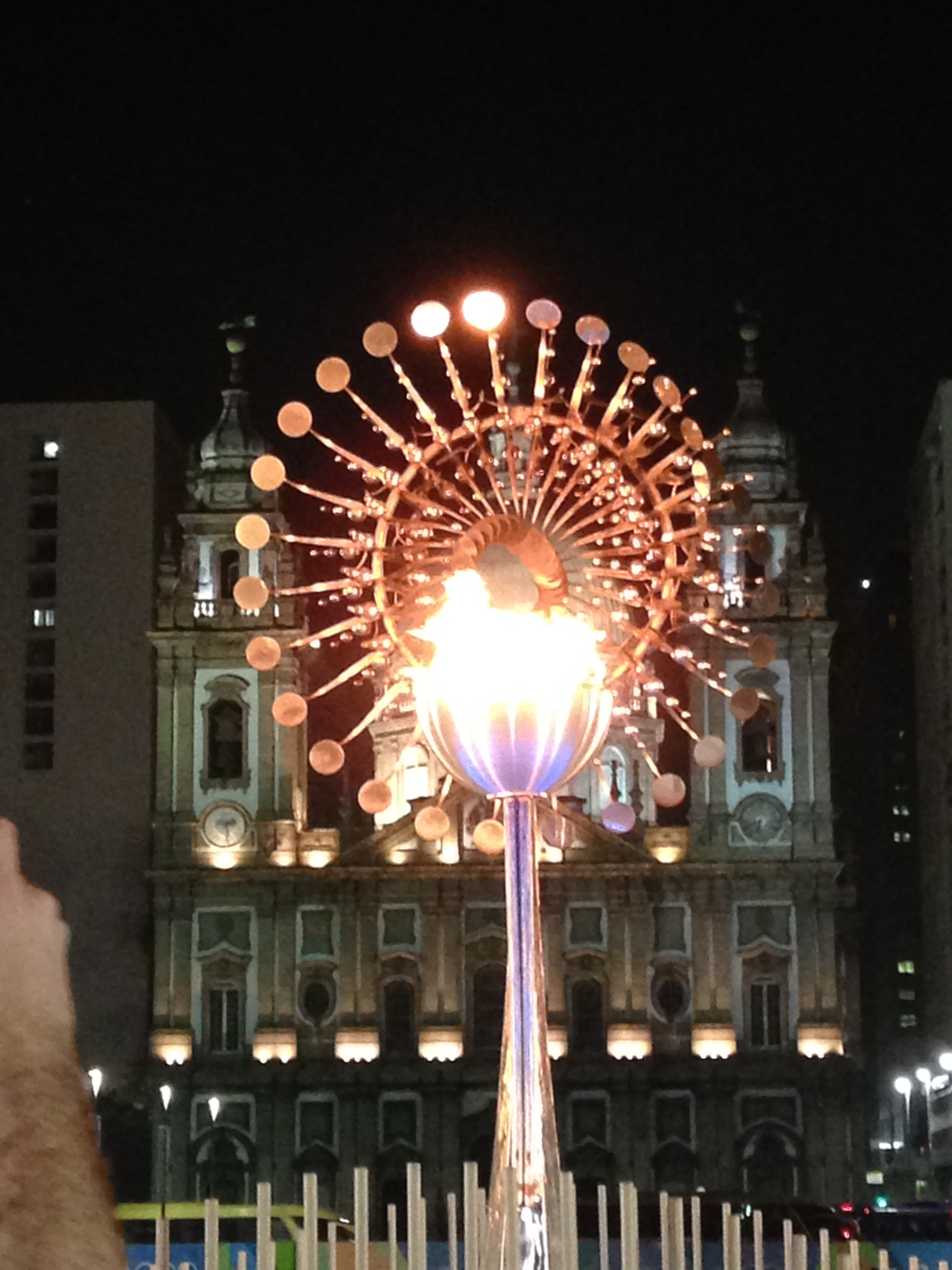 A Pira Olímpica da Rio 2016 foi exposta as todos no Boulevard Olímpico para que pussem ver a chama olímpica.